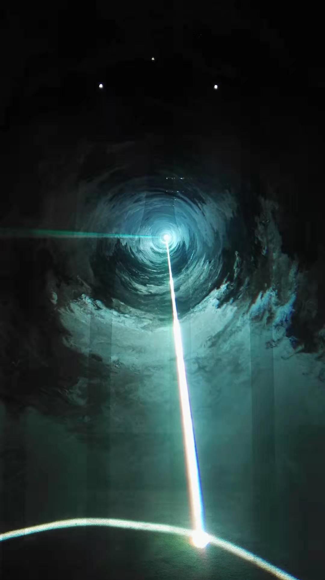 瑰麗·猶在境的雲軸入境，表現雲霞山水